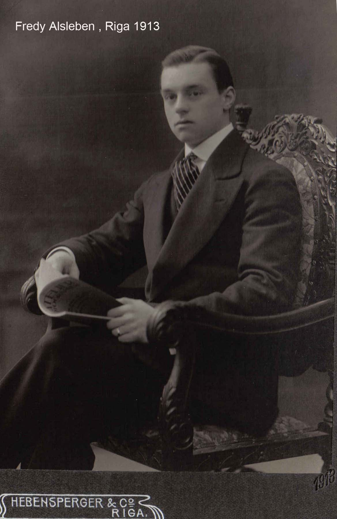 Alfred Alsleben als Zivilist in Riga